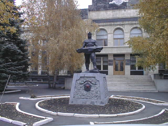 Antratsyt, Luhans'ka oblast, Ukraine